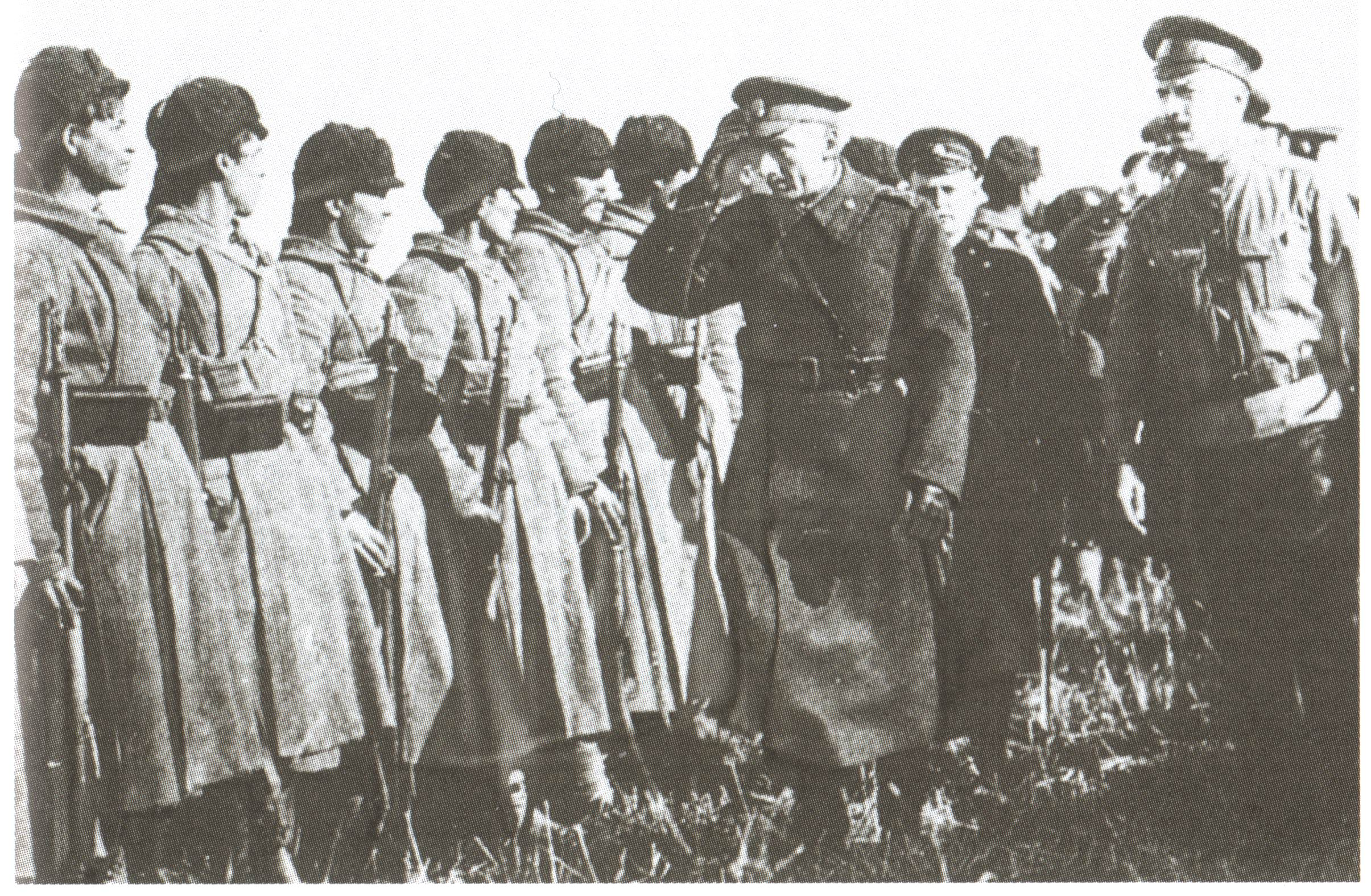 Верховный правитель и Верховный главнокомандующий на фронте.